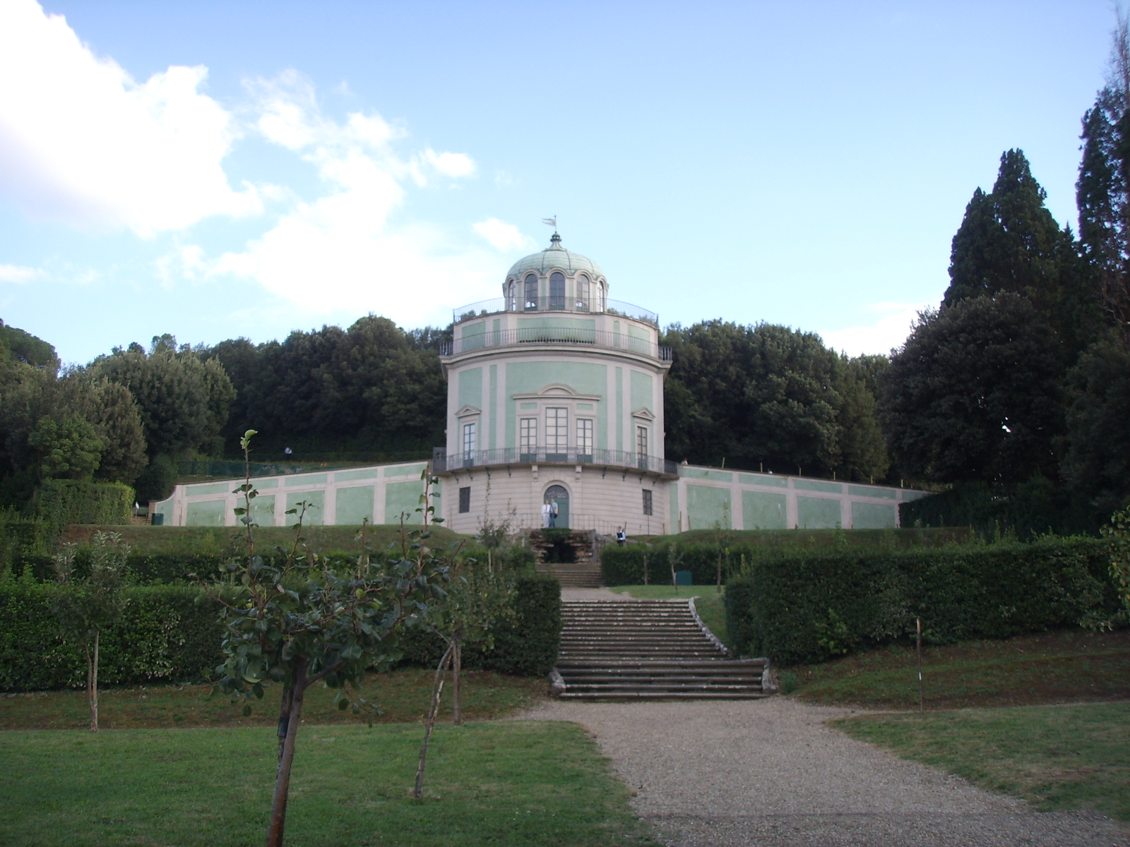 Boboli, kaffeehaus